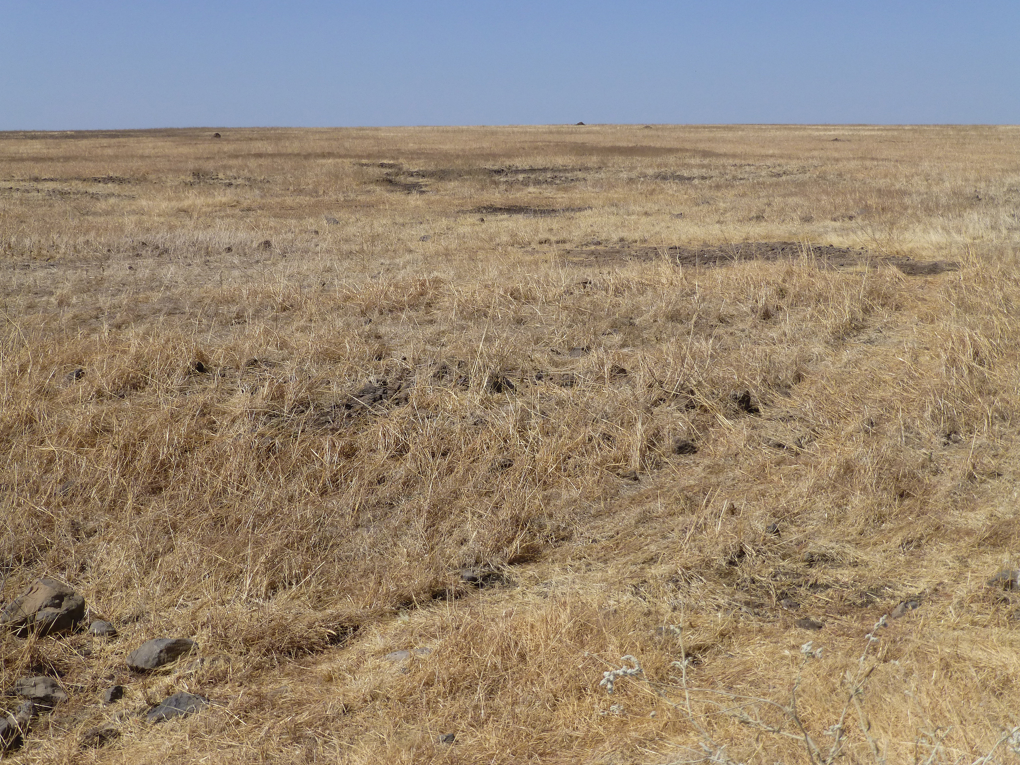 Traversée du Parc national de Yangudi Rassa (région Afar, Ethiopie)